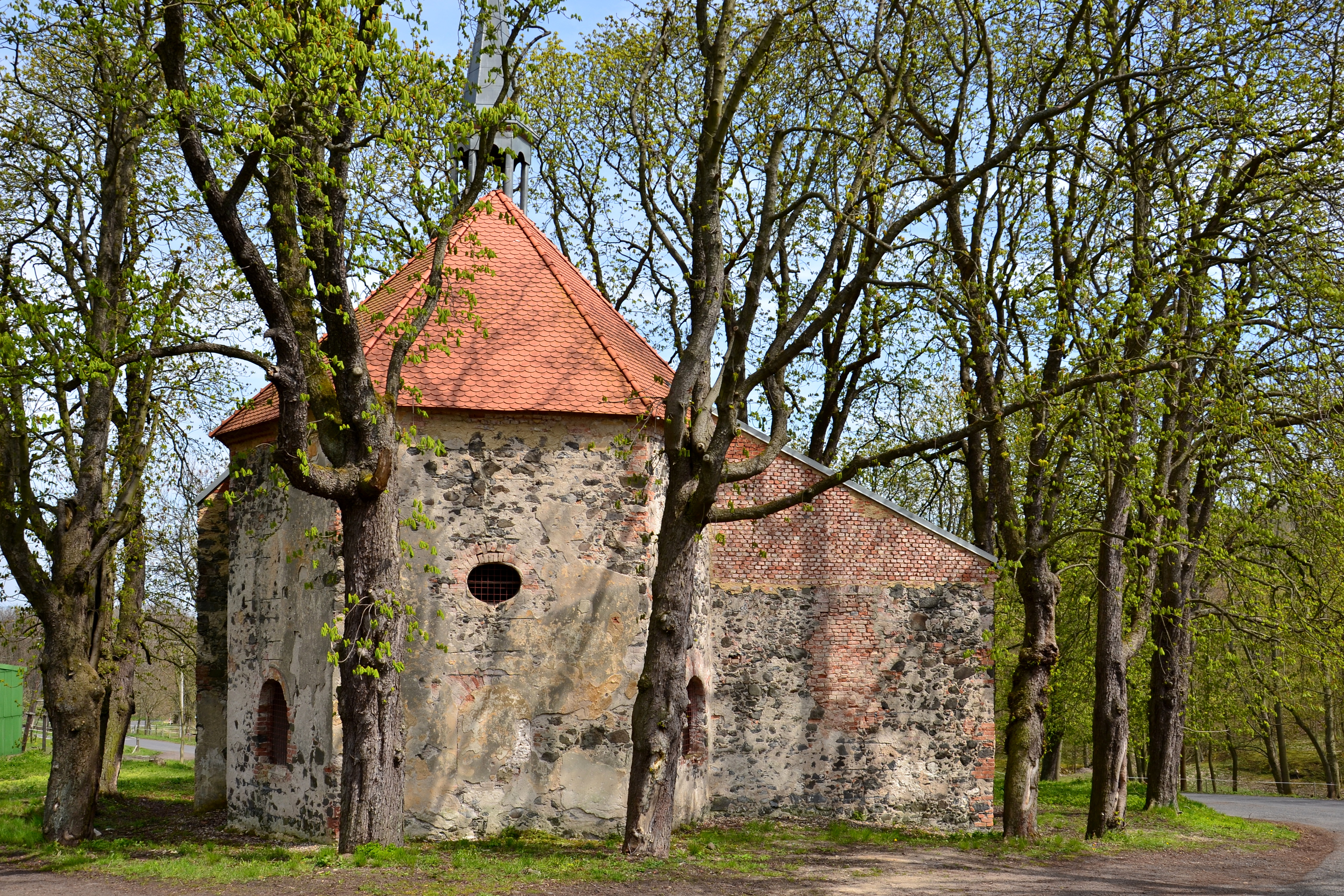 Kaple svatého Michaela v Bukovině v Doupovských horách